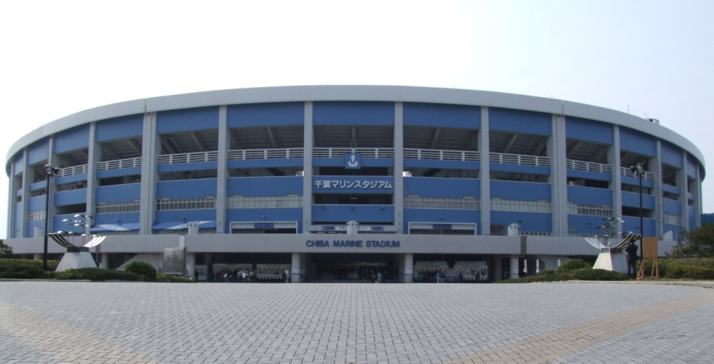 利用者:ROGによる撮影（2006年3月9日撮影） 2006年3月10日 (金) 16:04 . . ROG . . 1008×514 (299 キロバイト)